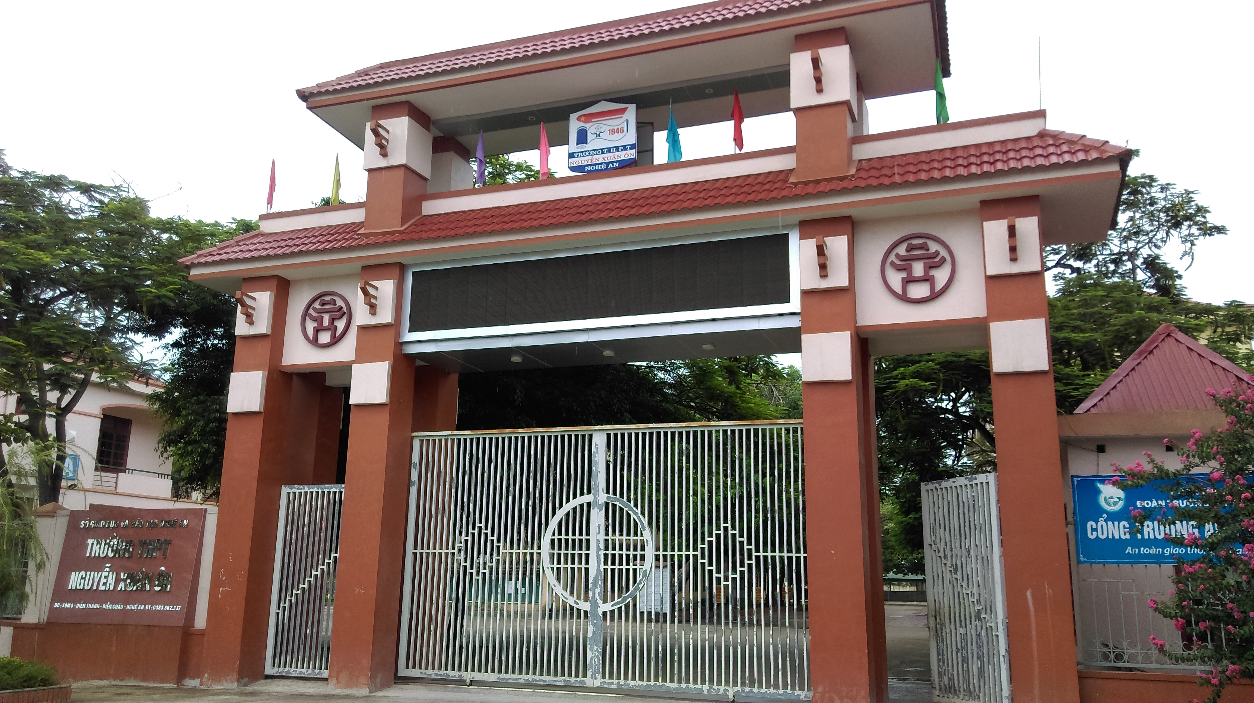 Trường THPT Nguyễn Xuân Ôn, Diễn Châu, Nghệ An